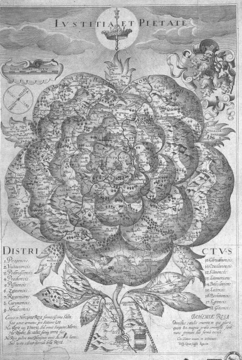 Mapa Bohemiae Rosa (autor:Kryštof Vetter), vyšla roku 1668, autor zemřel 18. července 1650